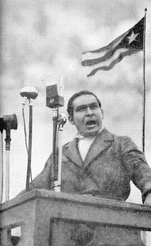 Fulgencio Batista, 1950s